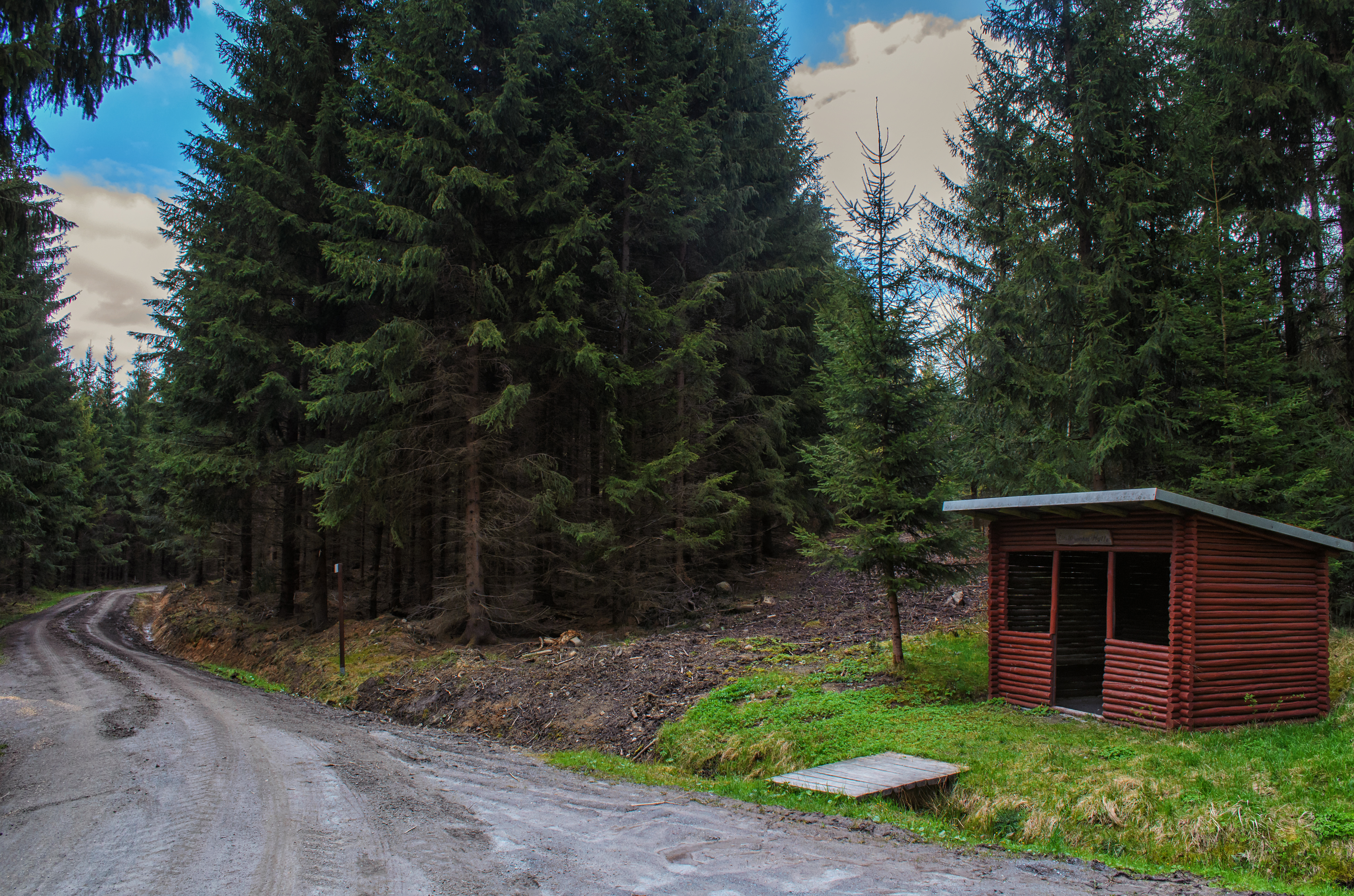 Waldweg und Schutzhütte im Sebnitzer Wald in Sebnitz (Sachsen), Bereich im FFH-Gebiet DE-5051-301 „Sebnitzer Wald und Kaiserberg“ – Das Foto habe ich während meines Wanderurlaubs gemacht.